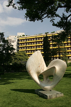 Hotel "Royal Plaza"